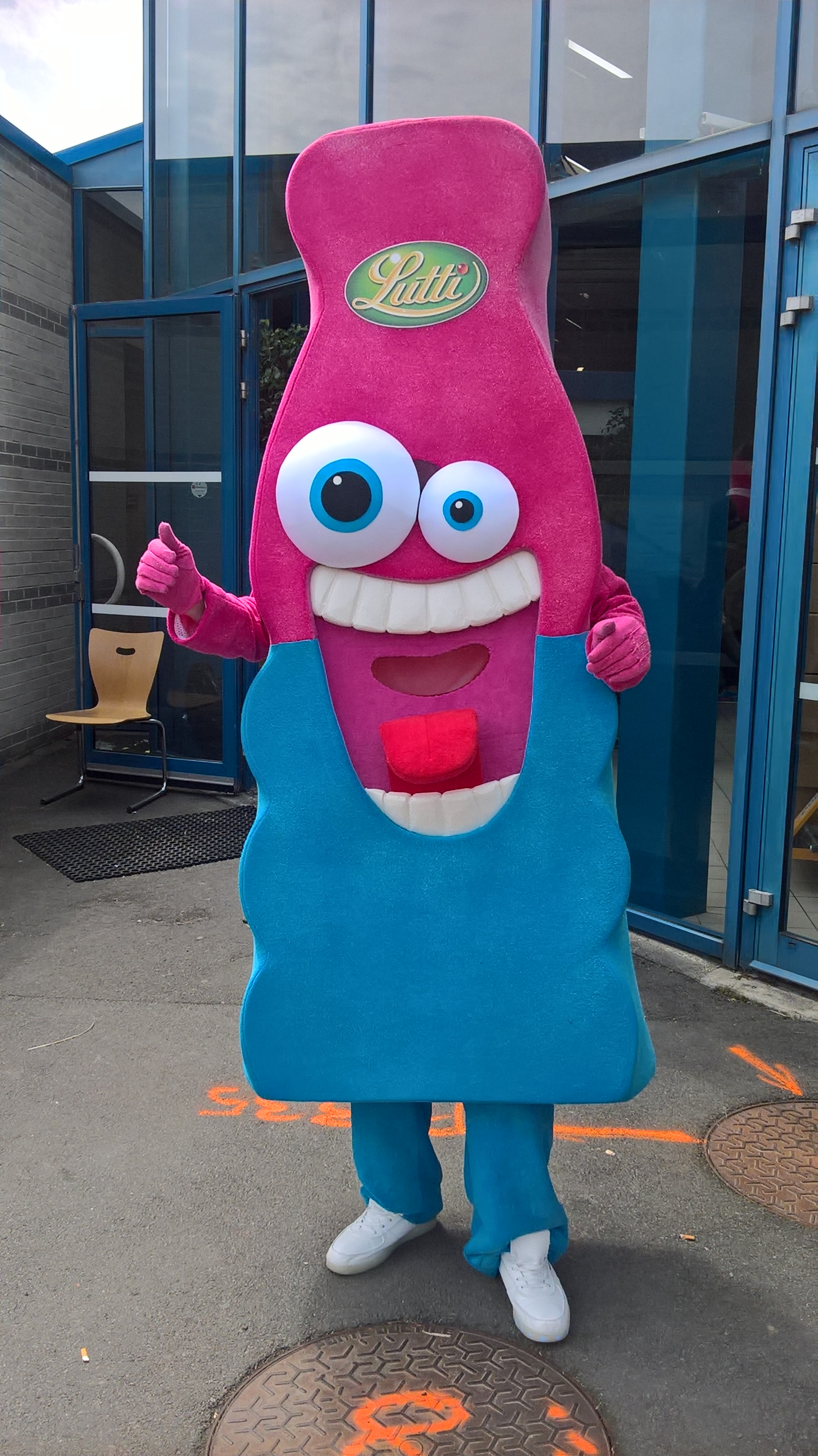 Mascotte Lutti avec un Bubblizz.